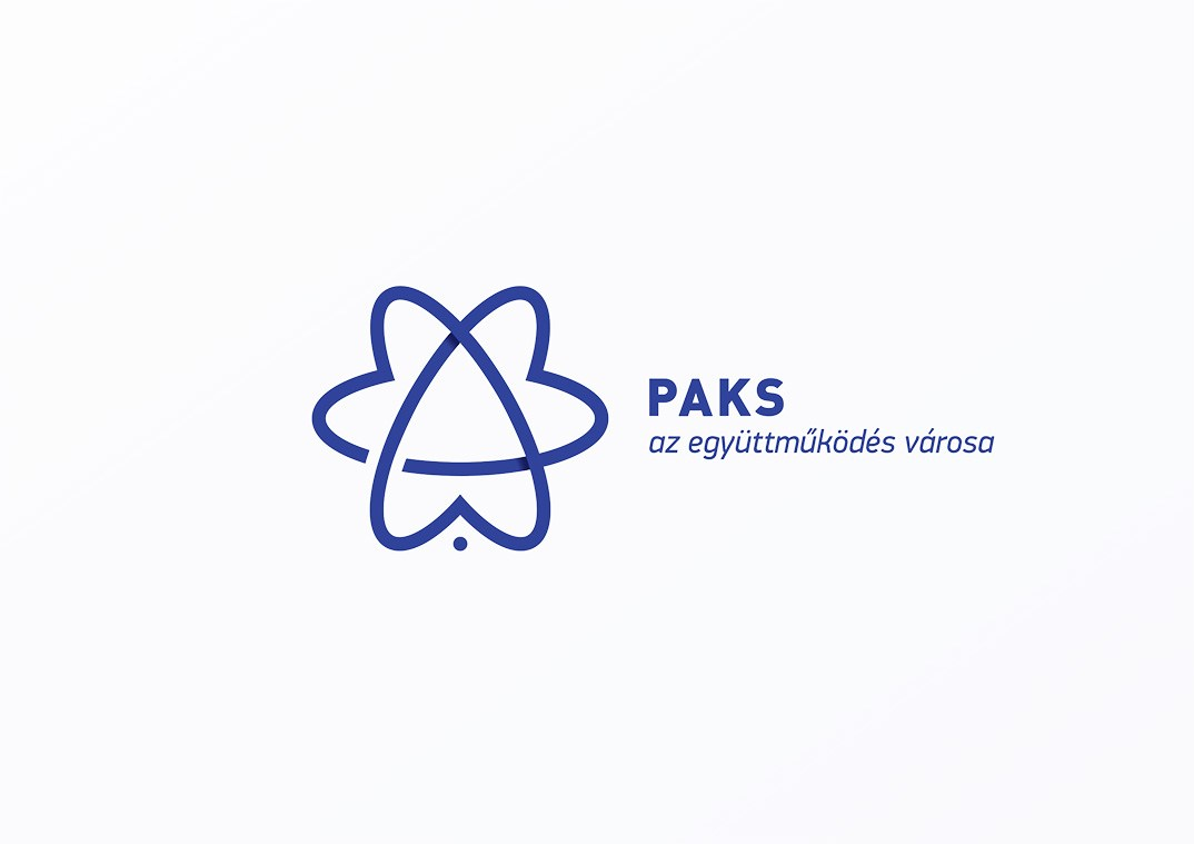 Paks város logógja